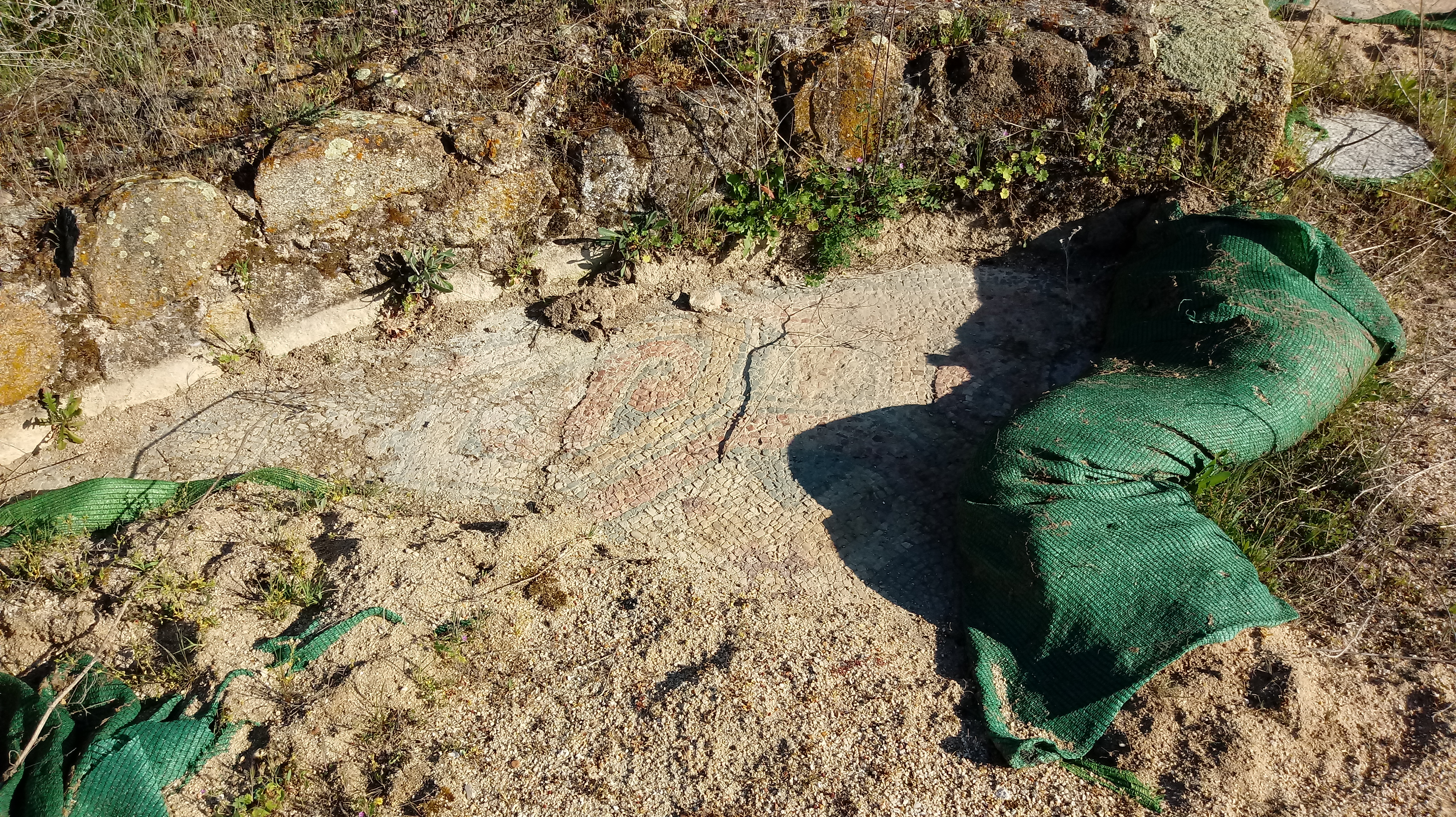 Mosaico romano abandonado a la intemperie